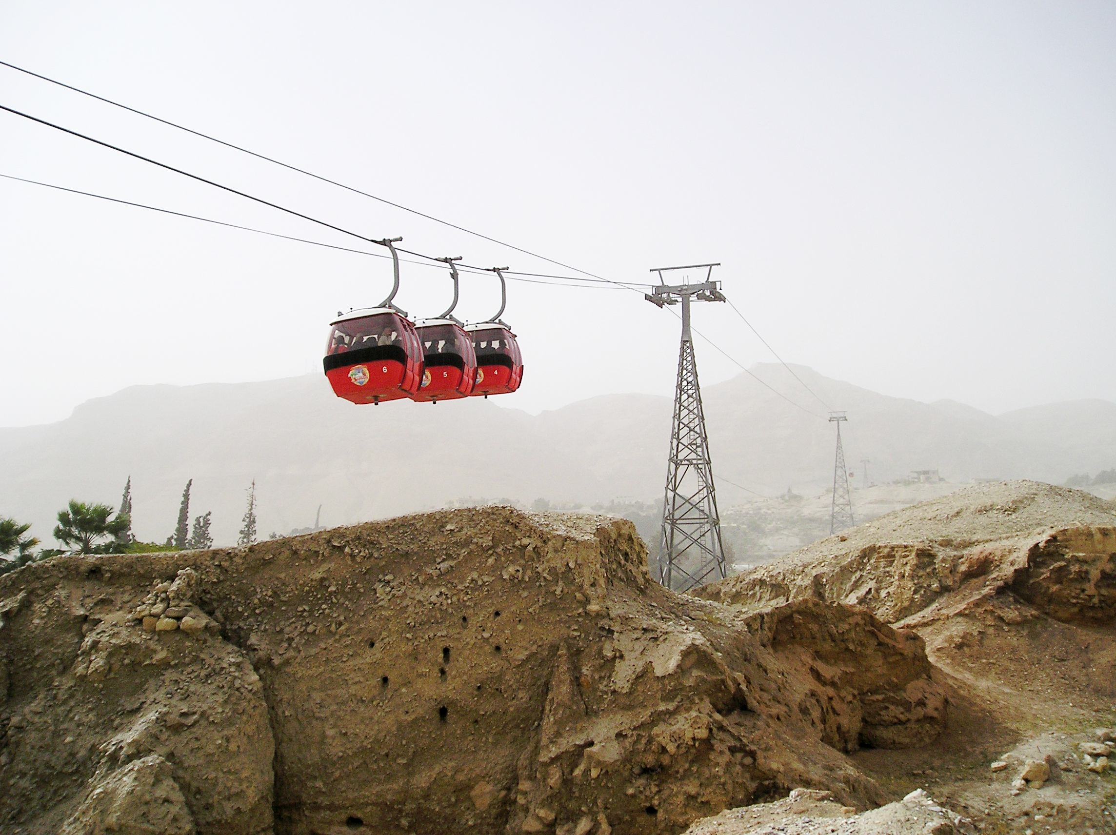 Kolejka gondolowa na Górę Kuszenia w Jerychu (Autonomia Palestyńska). Zdjęcie wykonał A. Sobkowski dn. 9 marca 2006.